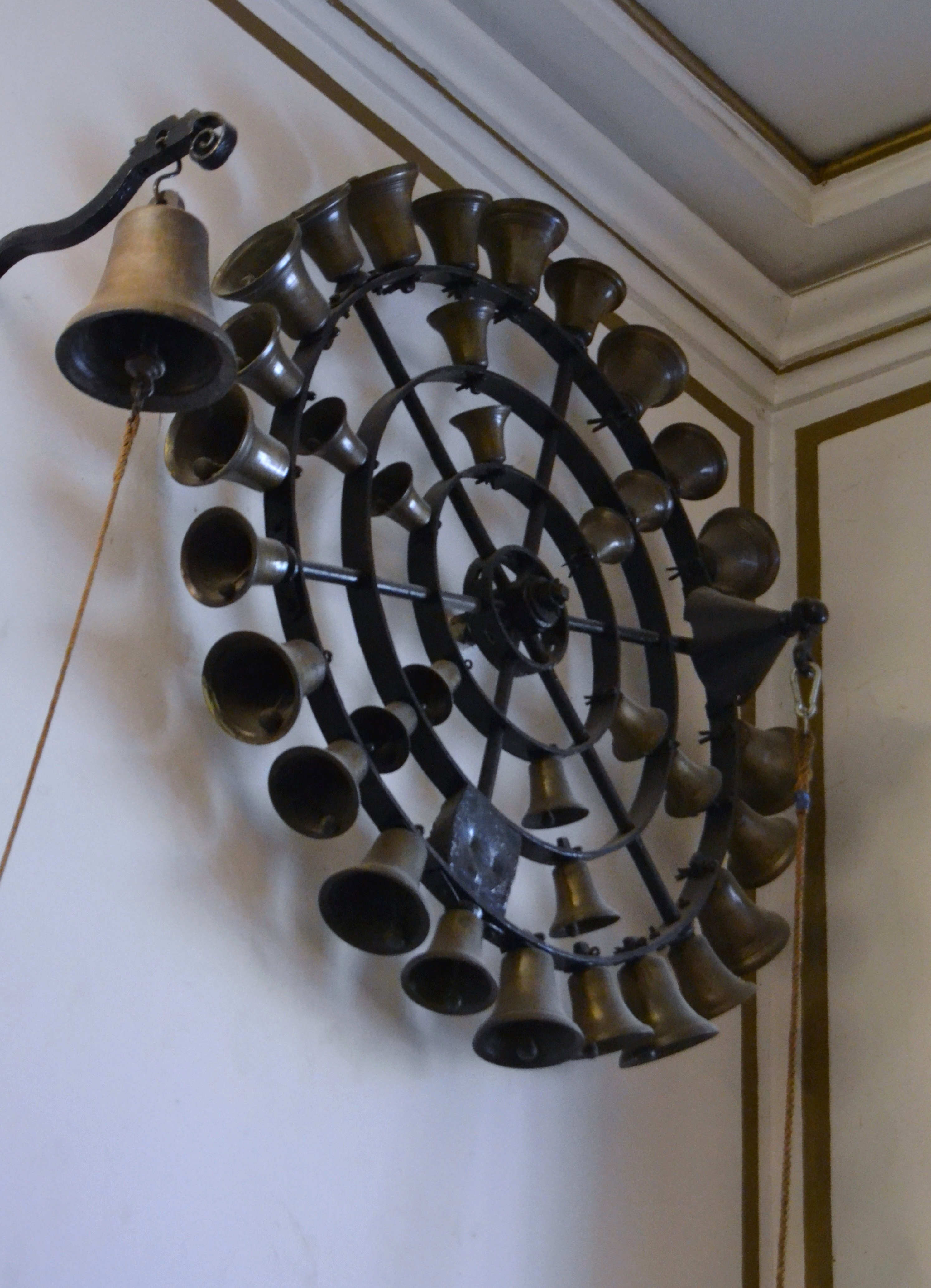 Rotgle de campanes, basílica de la mare de Déu dels Desemparats, València.